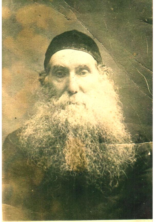 תמונת פרויל יחידה שיש למשפחה